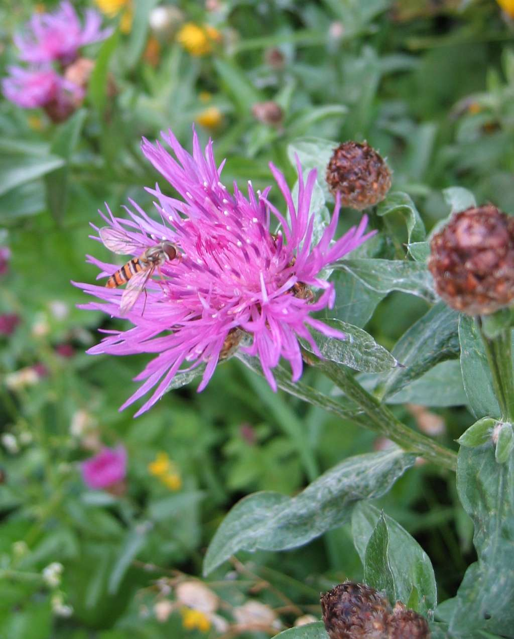 Wiesen-Flockenblume (Centaurea jacea). Bosruckhütte, Spital am Phyrn, Österreich.